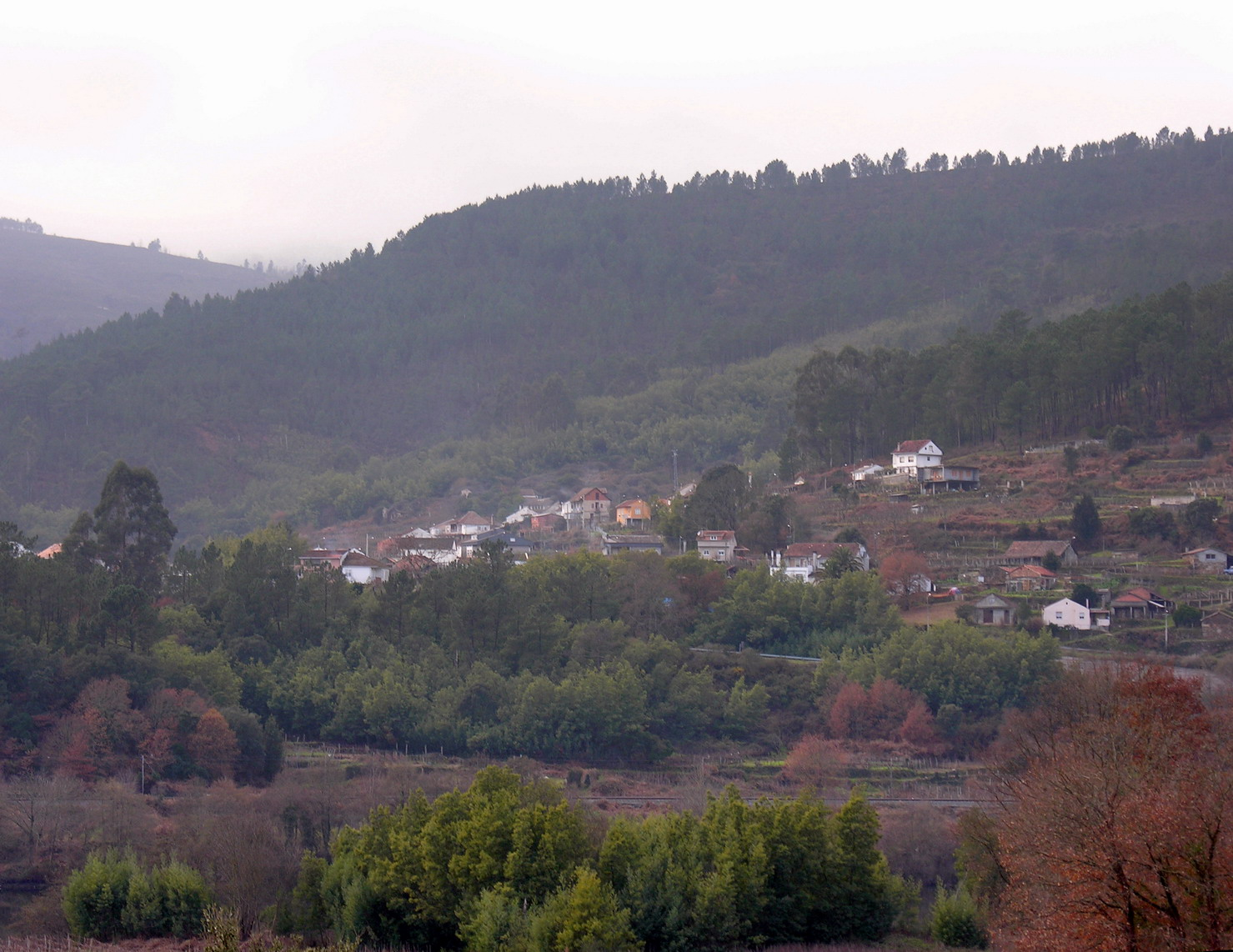 self made. Arnoia - Ribadavia - Ourense - Galicia - Spain